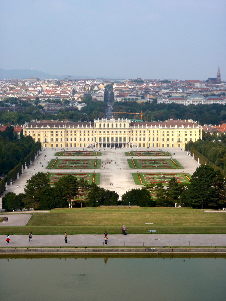 Schlossgarten Schönbrunn